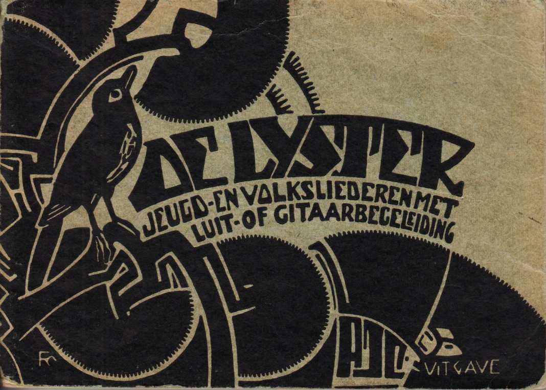 De lijster. Jeugd- en volksliederen, met aanwijzingen voor luit- of gitaarbegeleiding, bijeengebracht door Piet Tiggers. Amsterdam, A.J.C., 1928. Oblong 11 x 15 cm. Ingenaaid. 152 p. 3e druk. Omslag van Fré Cohen over voorzijde, rug en achterkant.